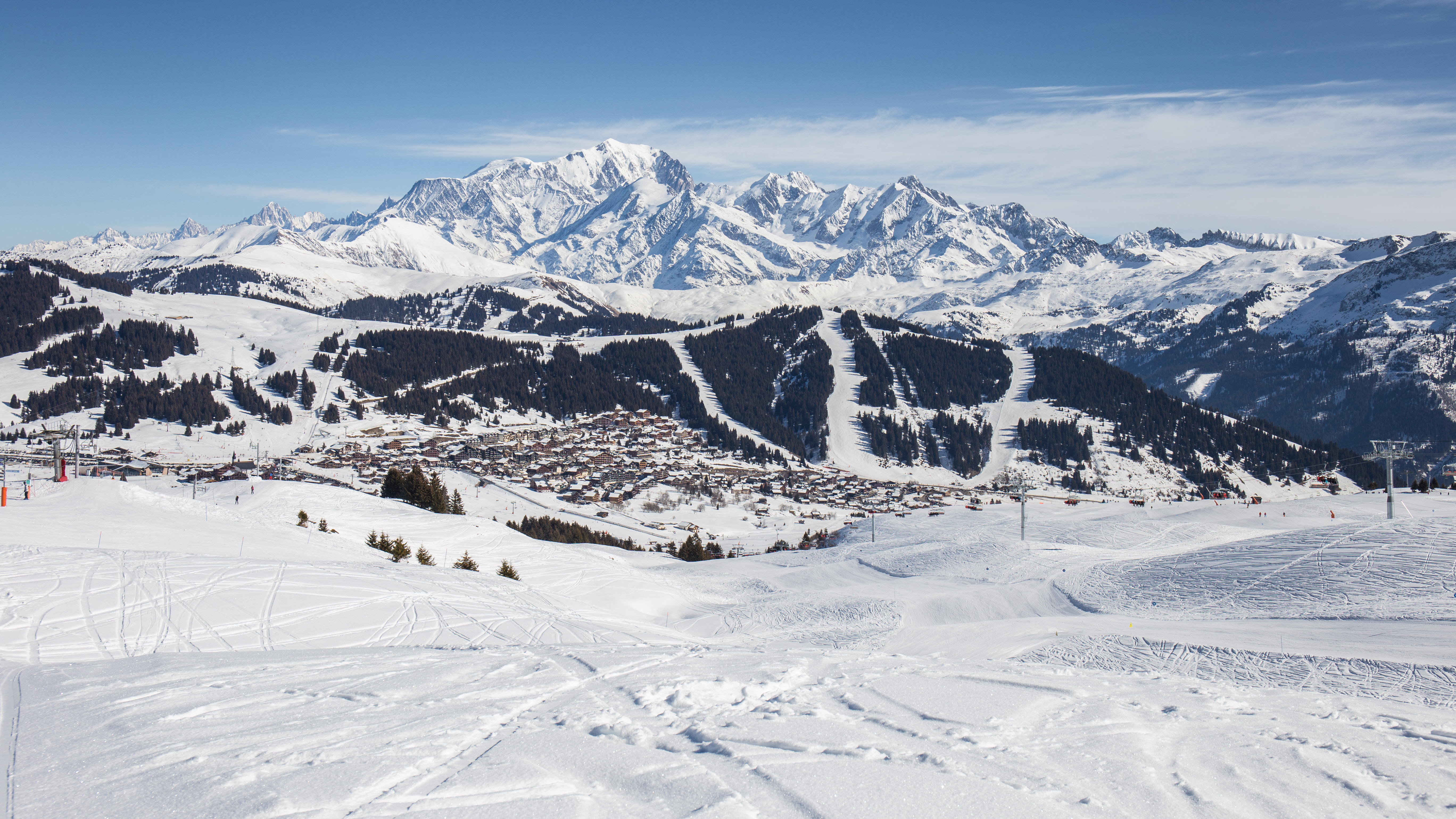 Les Saisies (hiver), au fond le Mont Blanc